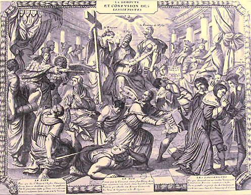 Gravure jésuite de 1653 représentant la condamnation des jansénistes